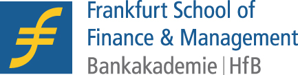 Offizielle Wort-Bildmake der FS